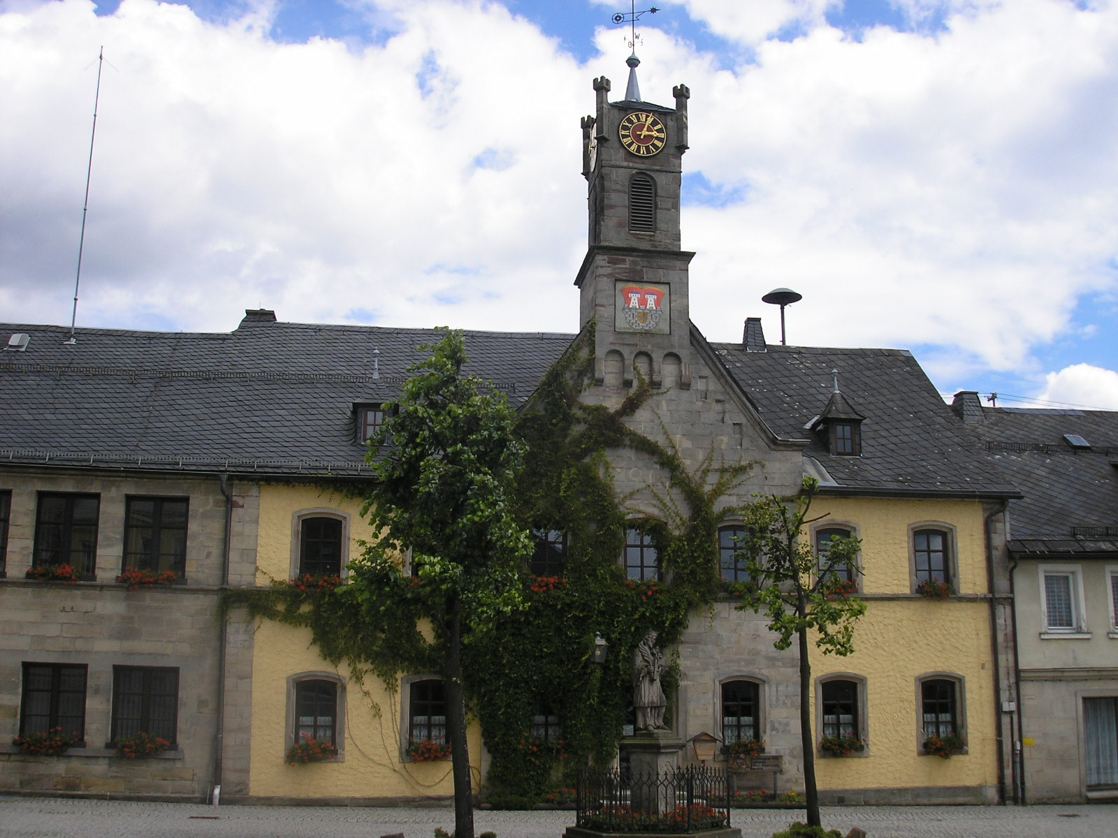 Das Rathaus von Teuschnitz.